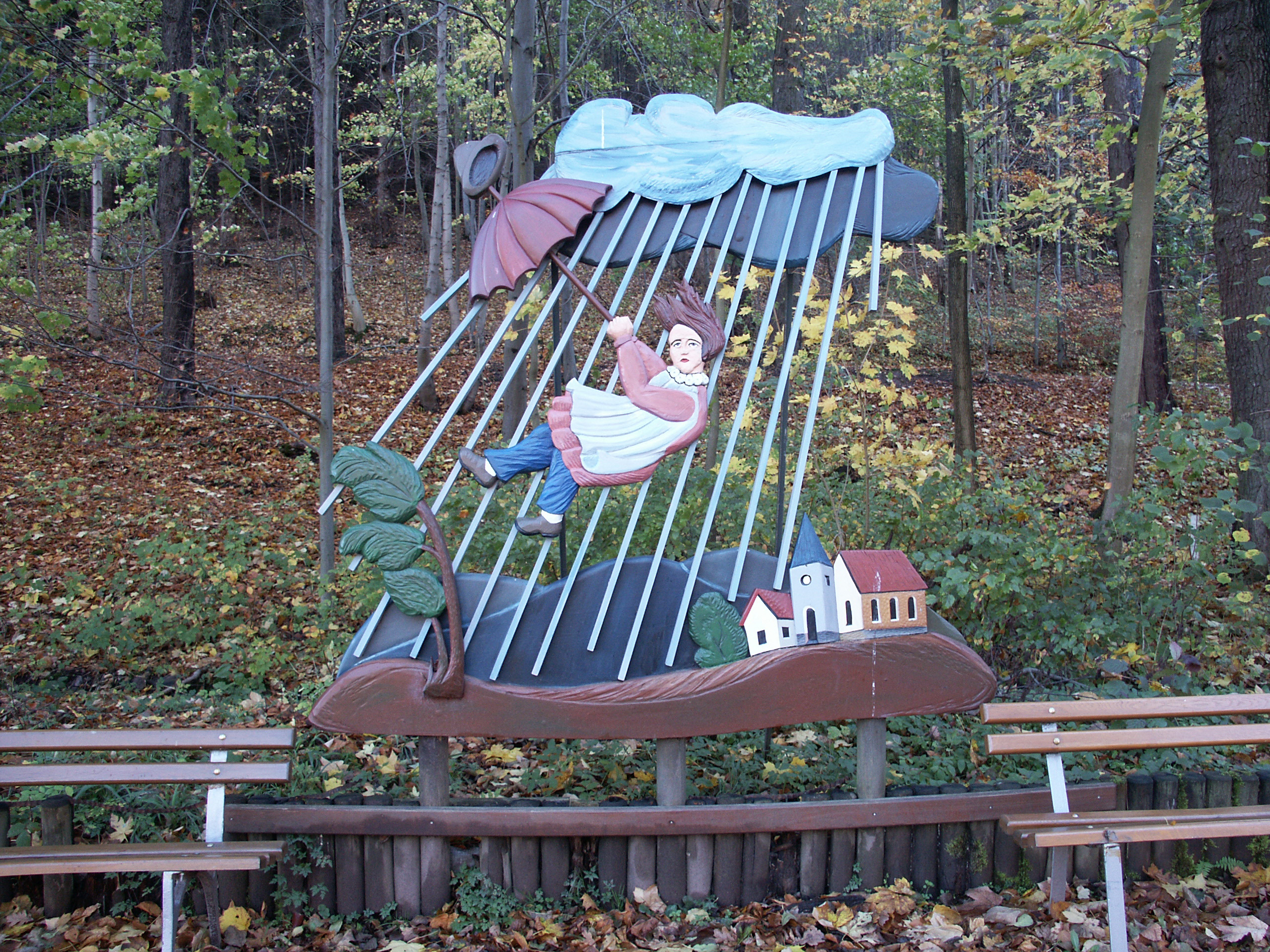 Struwwelpeter-Park Tabarz, geschnitzte Märchenfiguren "Die Geschichte vom fliegenden Robert"